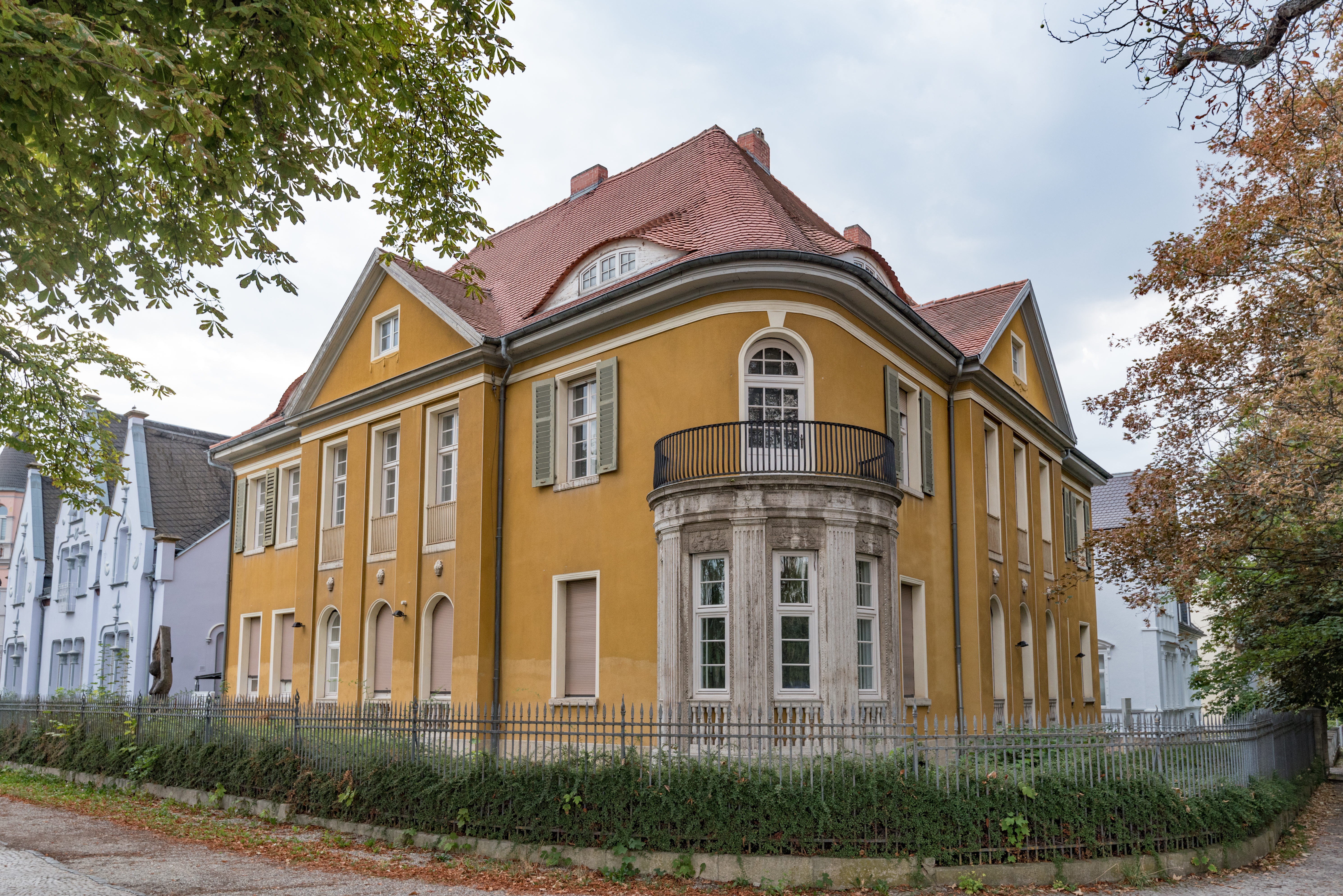 Naumburg (Saale), Wenzelsring 12